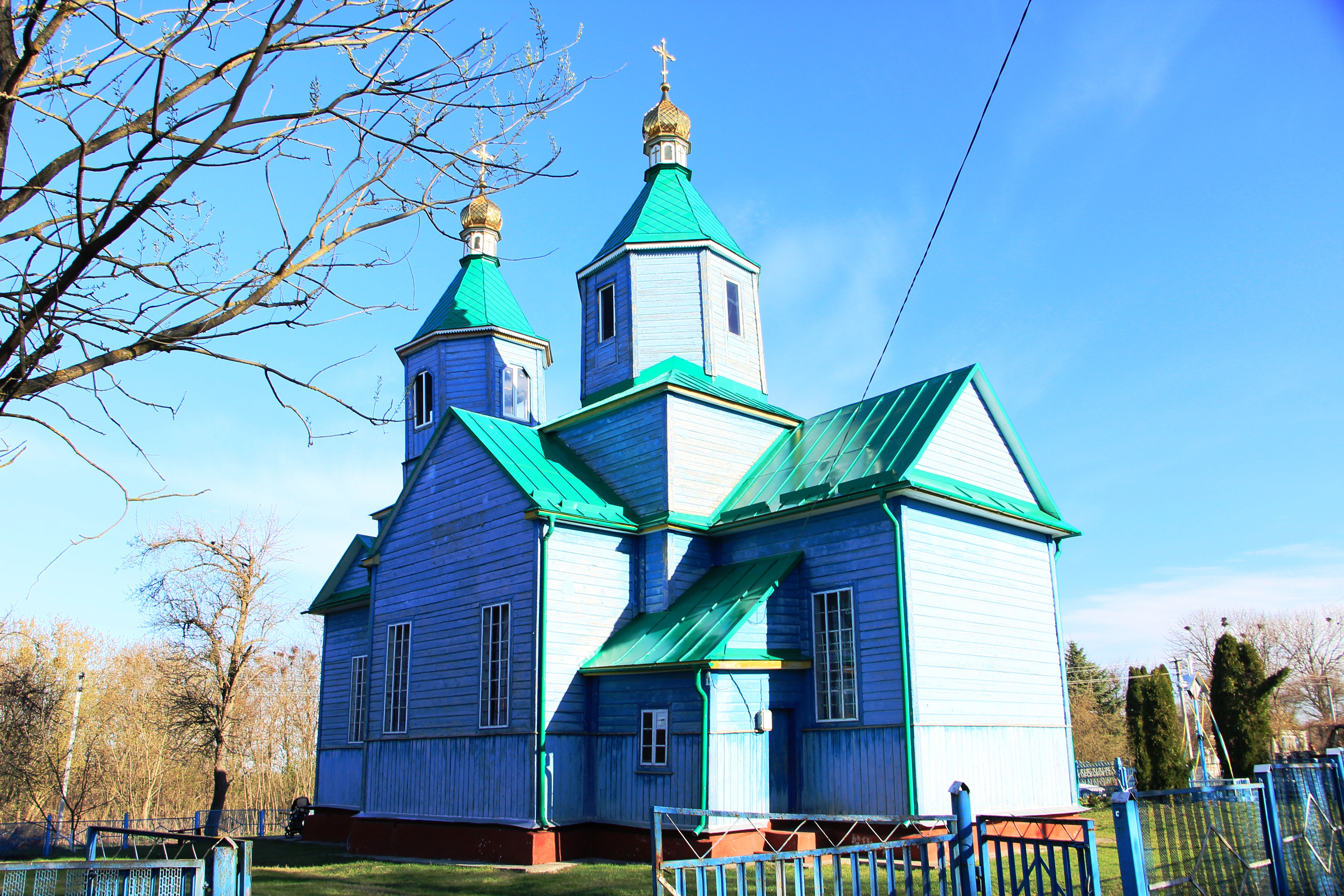 Дерев'яна церква в селі Катеринівка Кременецького району Тернопільської області